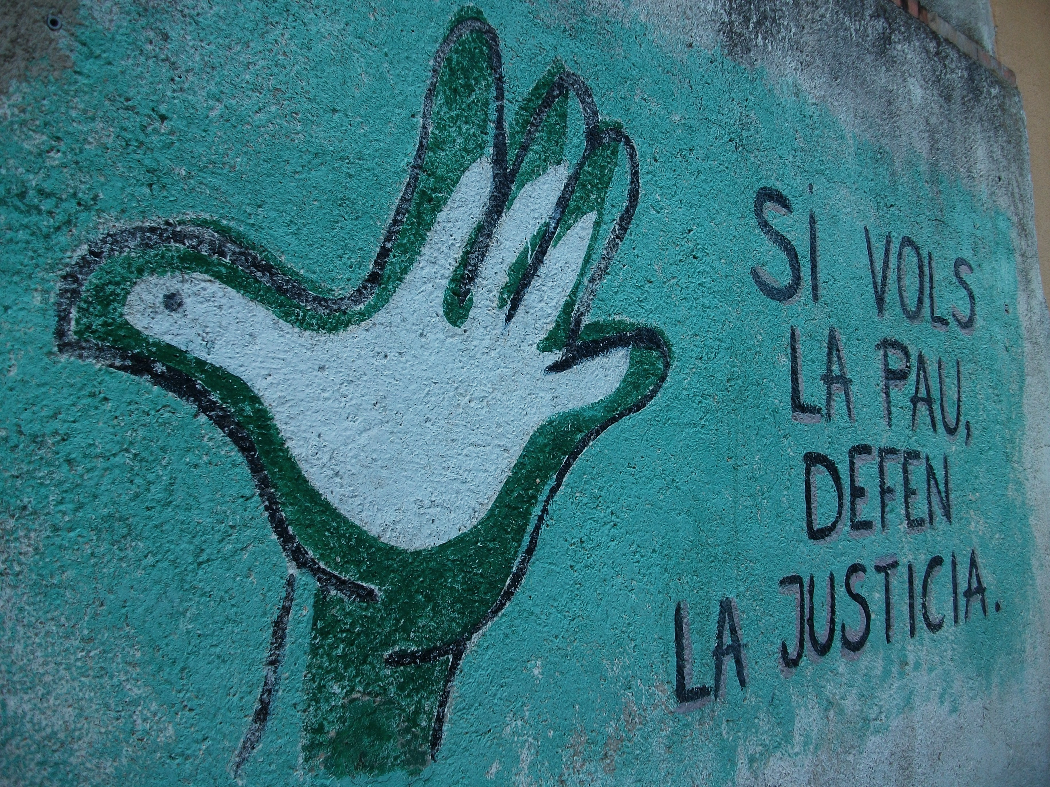 Mural a Alpatró, la Vall de Gallinera, País Valencià.